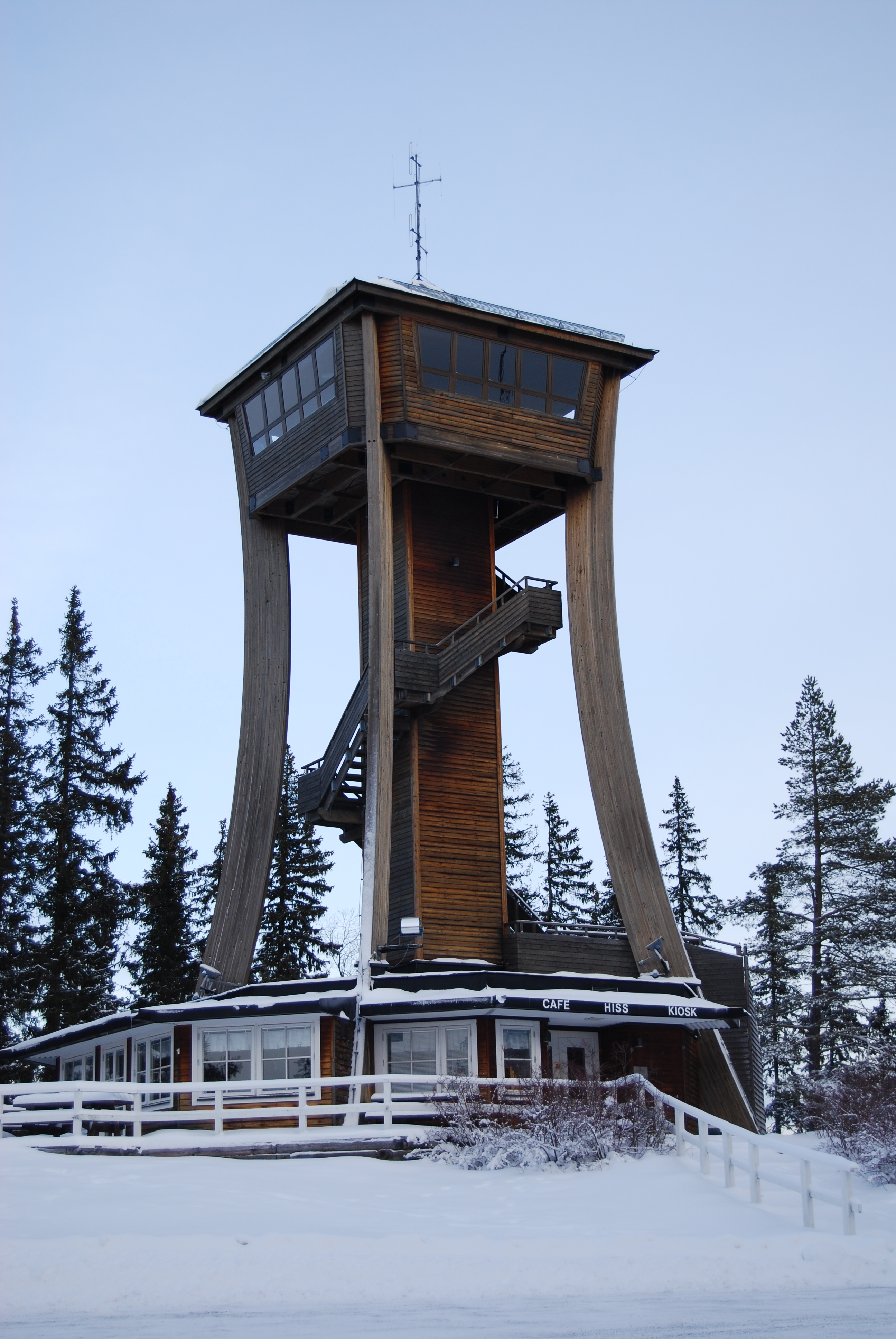 Frösötornet, Frösön, Sweden.